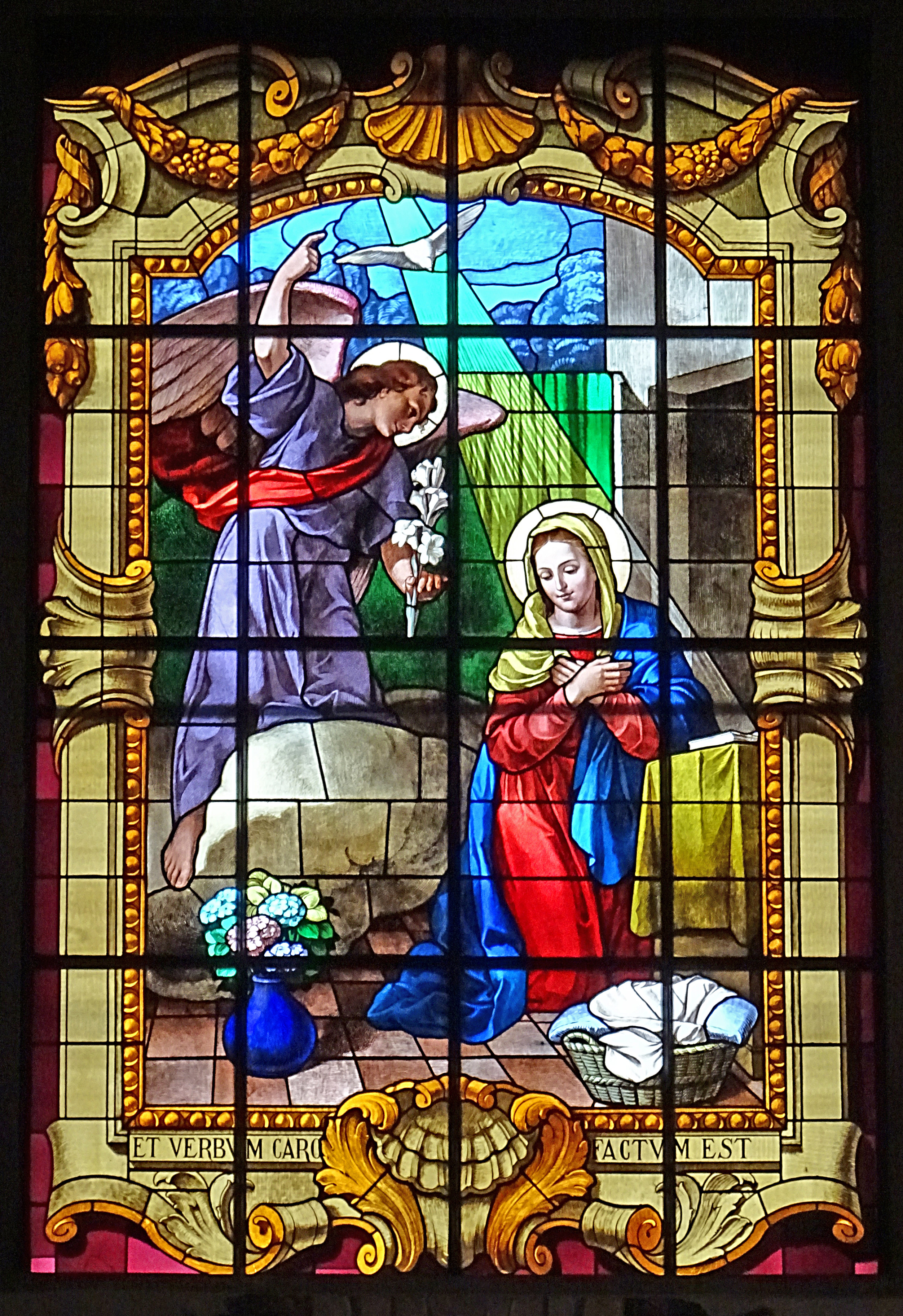 Verkündigung an Maria, Buntglasfenster in der Stiftskirche San Vittore (Verbania-Intra)